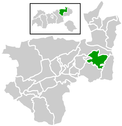 Lage der Gemeinde innerhalb des Bezirks Kufstein